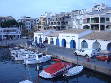 Vista general del puerto deportivo de cala ratjada